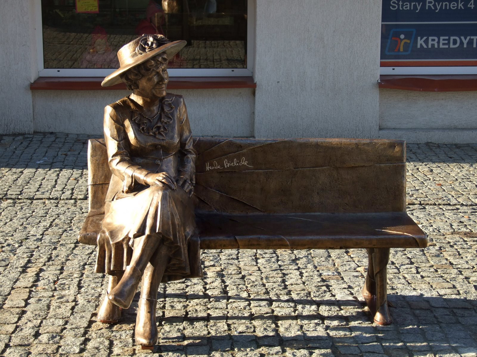 Pomnik (ławka) Hanki Bielickiej w Łomży na ulicy Farnej, autor Michał Selerowski